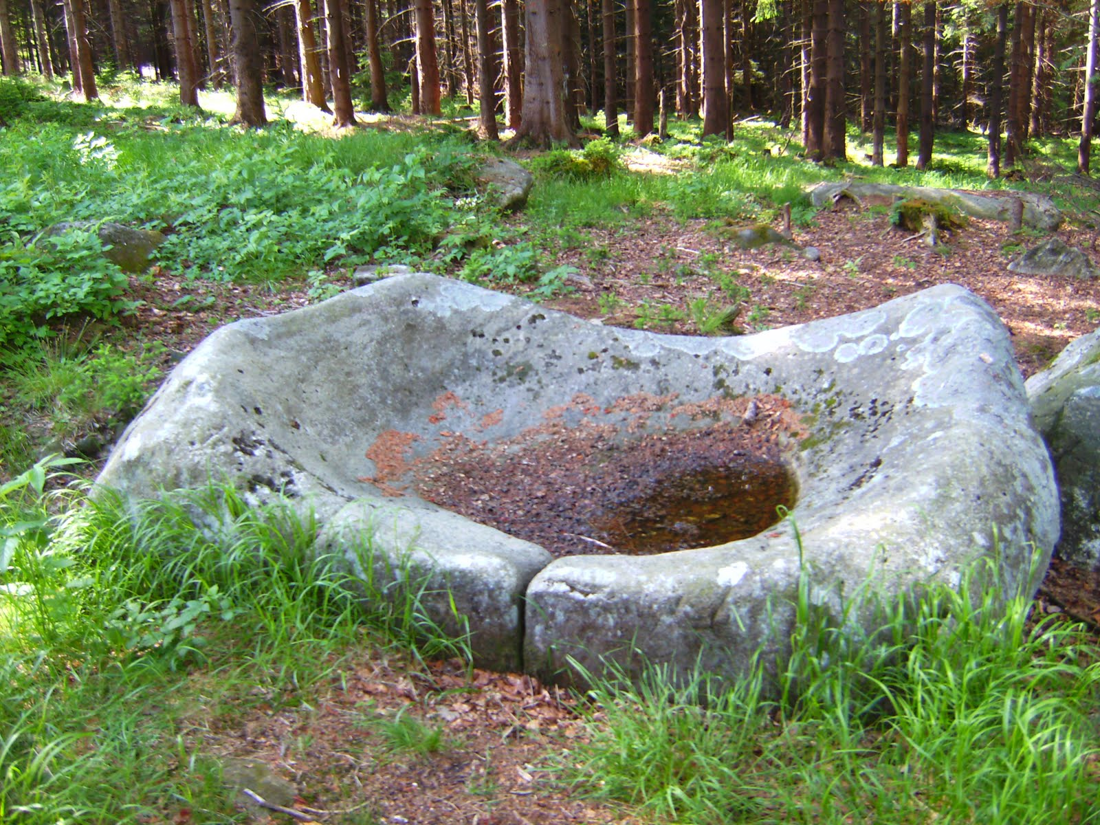 Opferwanne